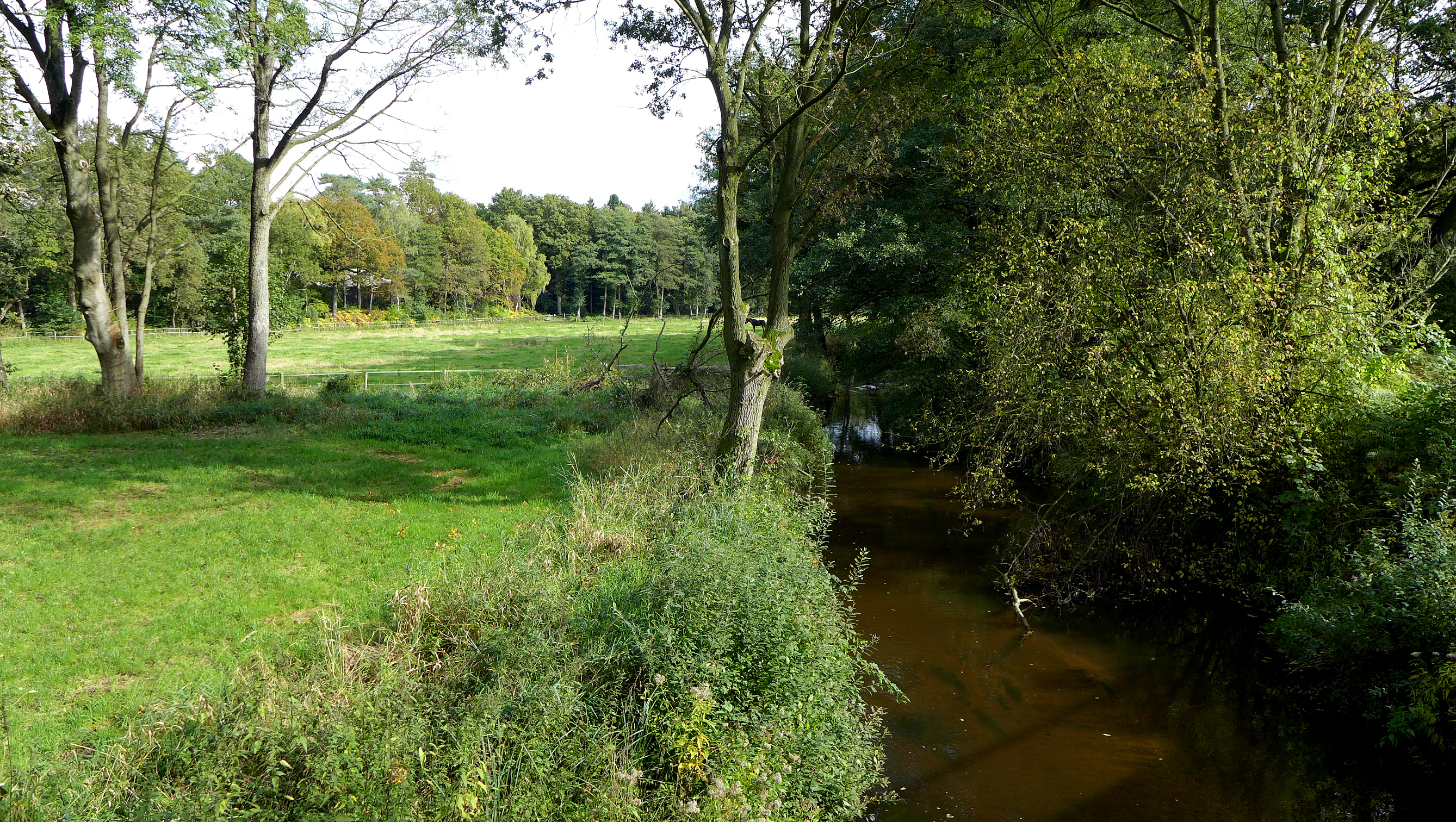 Die Wiedau bei Bellen nahe Brockel im Landkreis Rotenburg (Wümme). In 400 m Entfernung oberhalb des Aufnahmestandpunktes ist der Zulauf des Hahnenbaches.